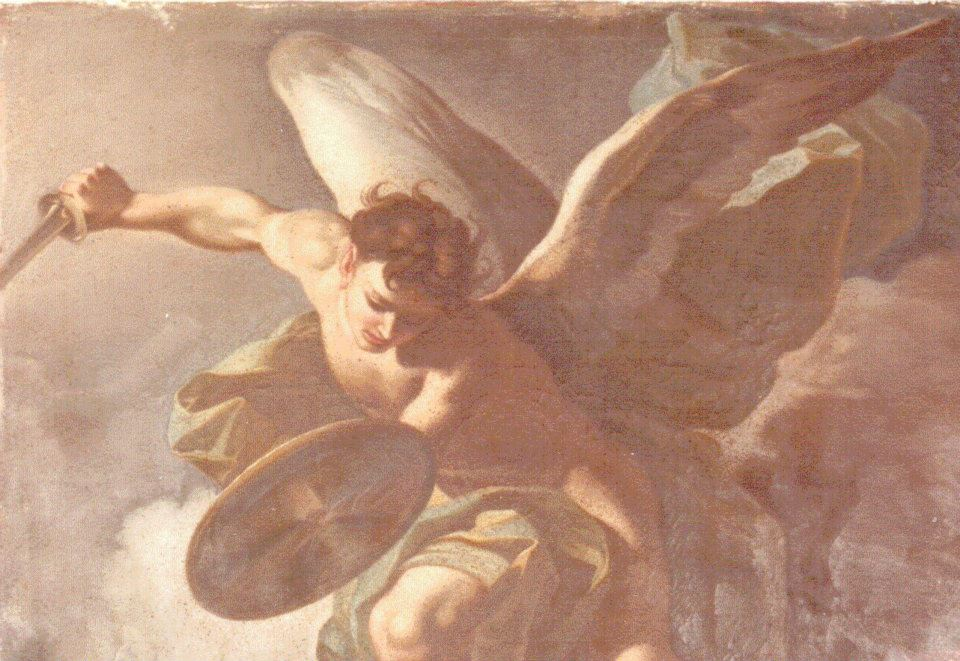 Cacciata degli angeli ribelli dal paradiso. Opera di Francesco Solimena, sagrestia del Santuario dell' Assunta.